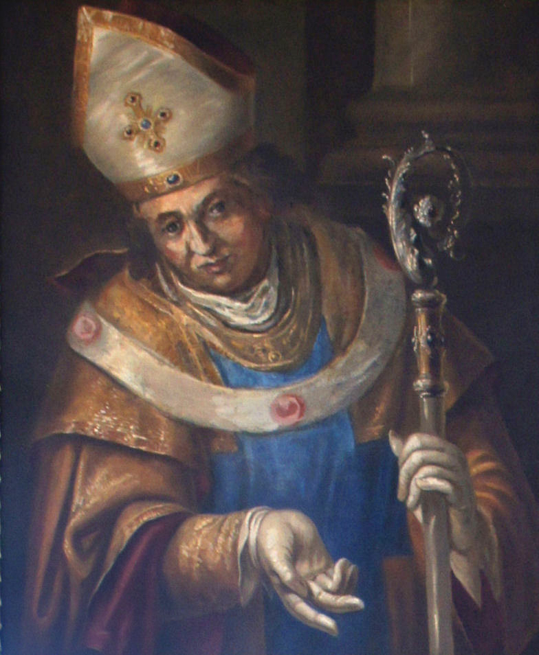 Porträtgemälde von Leo Lösch von Hilkertshausen, Fürstbischof von Freising, im Fürstengang zwischen Fürstbischöflicher Residenz und Freisinger Dom.